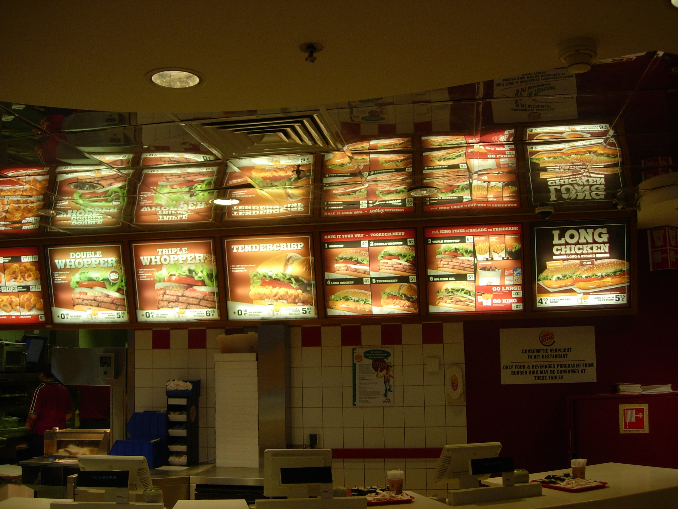 荷蘭阿姆斯特丹中央車站的漢堡王分店。